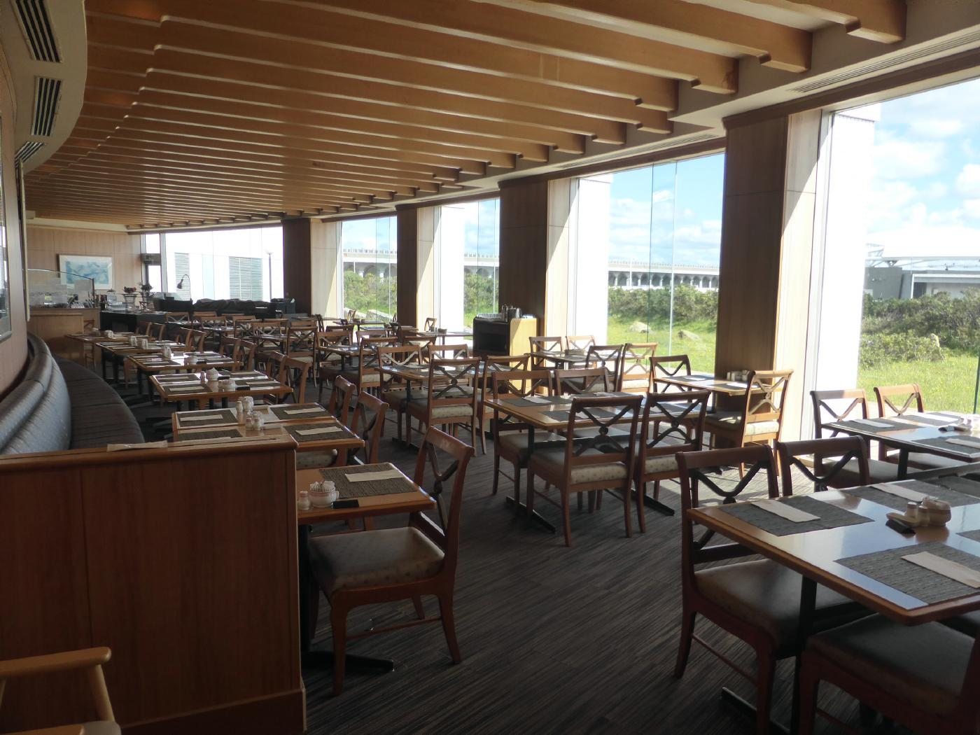 1Fのカフェレストラン マリーヌ